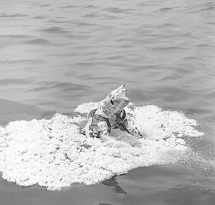 Marta Minujín. Momentos de la performance Leyendo las noticias, 1965, Costanera Sur, Buenos Aires